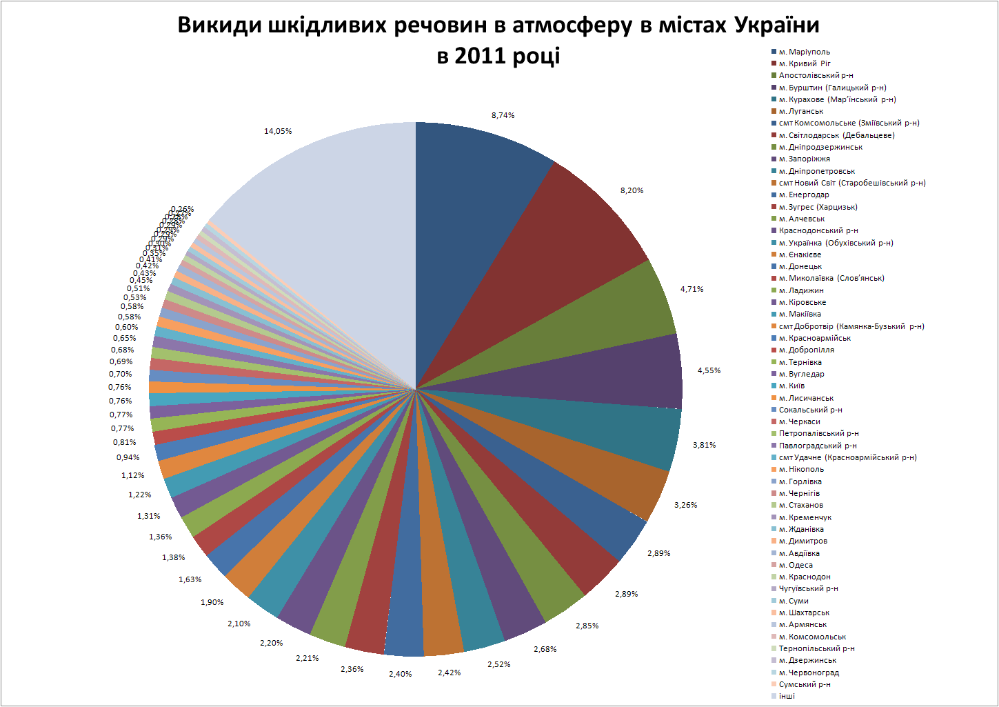 за даними експрес-випусків обласних управлінь статистики України в 2011 році